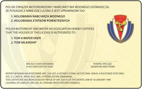 Rewers patentu motorowodnego na holowanie.